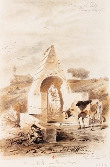 Sainte-Anne-la-Palud au milieu du XIXe siècle (dessin de Léon Gaucherel).